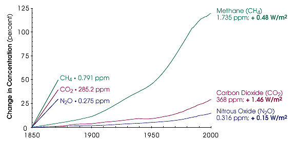 Broeikasgastoename.